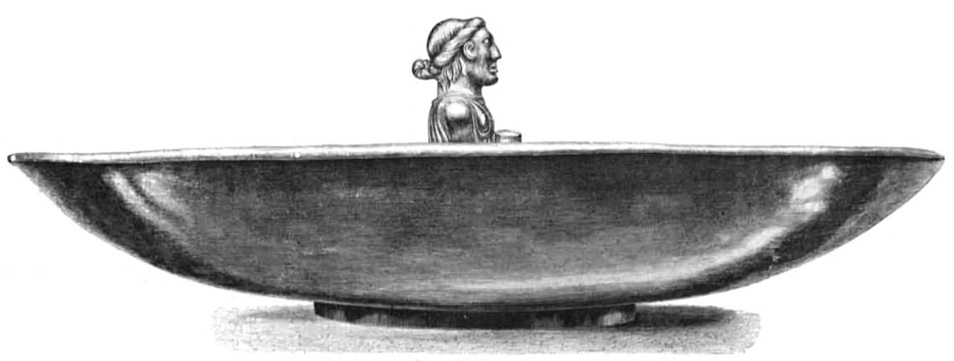 Patera de la Pietrosa - vedere laterală realizată de Alexandru Odobescu